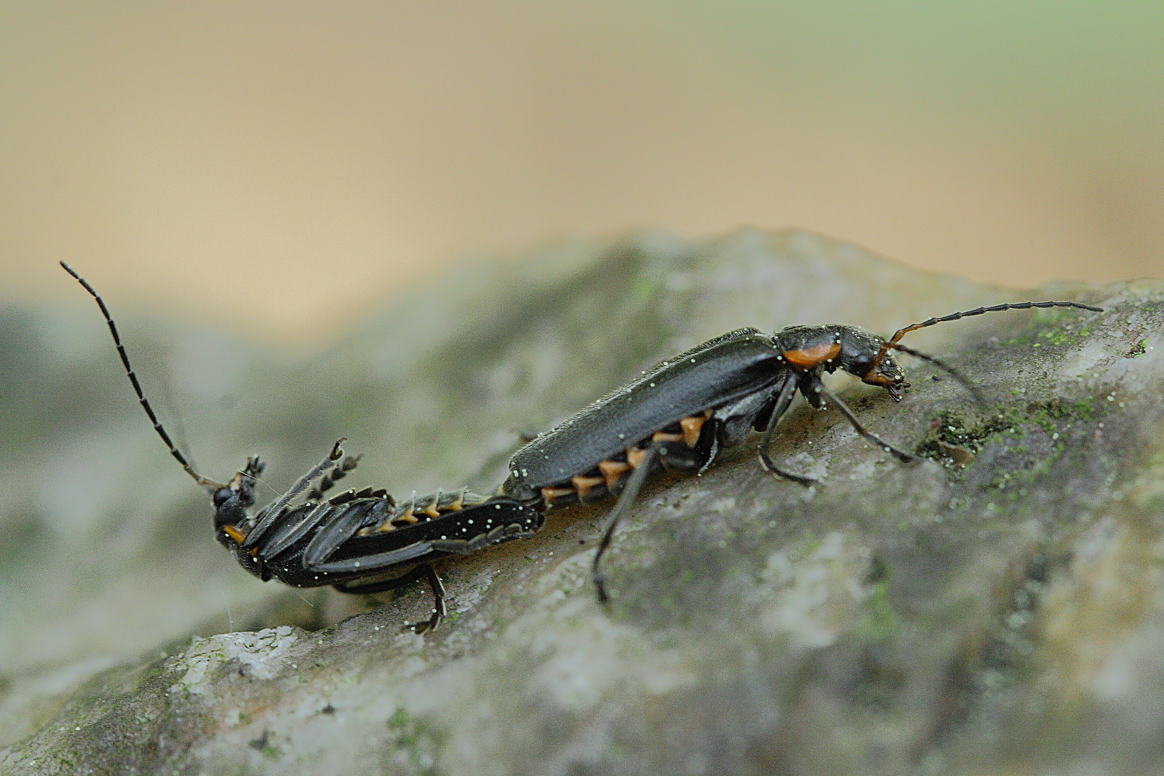 Dunkler_Fliegenkäfer,_Paarung